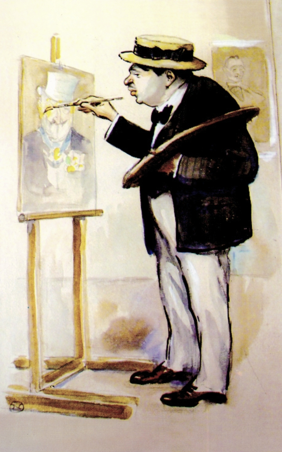 Alexandru Steriadi